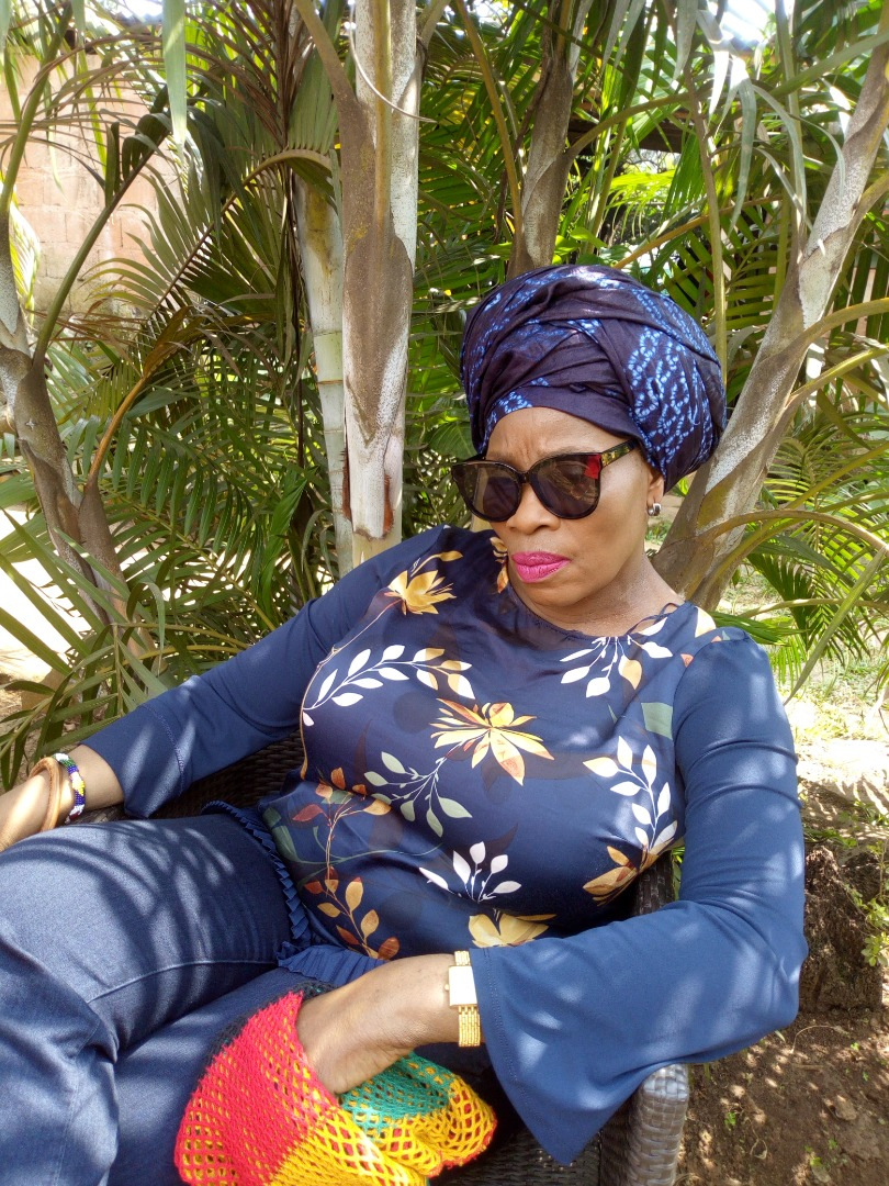 K-Tino en 2018.